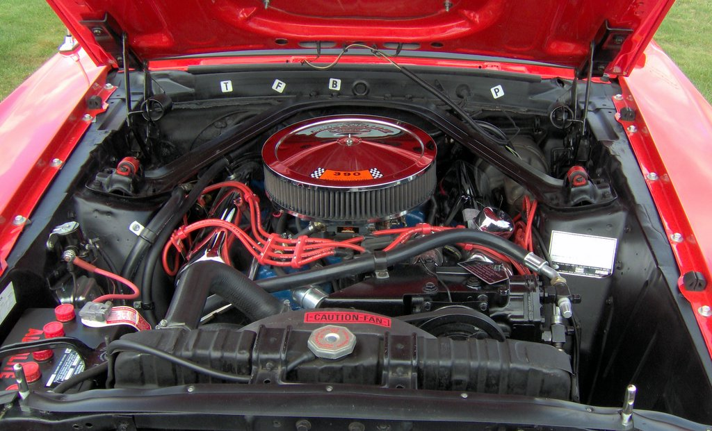 1969 Ford Mustang 390 FE big-block